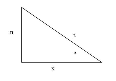 slika predstavlja kosinu kao pravokutni trokut